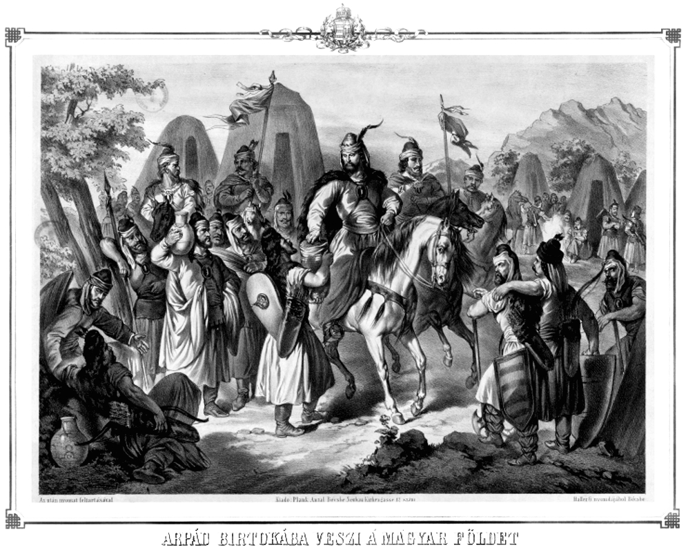 Titel Fürst Árpád nimmt von der ungarischen Erde Besitz Weitere Titel ARPÁD BIRTOKÁBA VESZI A' MAGYAR FÖLDET. Beschreibung Lithografie von Vinzenz Katzler (zugeschr.), Wappen. Autor Haller, G. Katzler, Vinzenz Plank, Anton